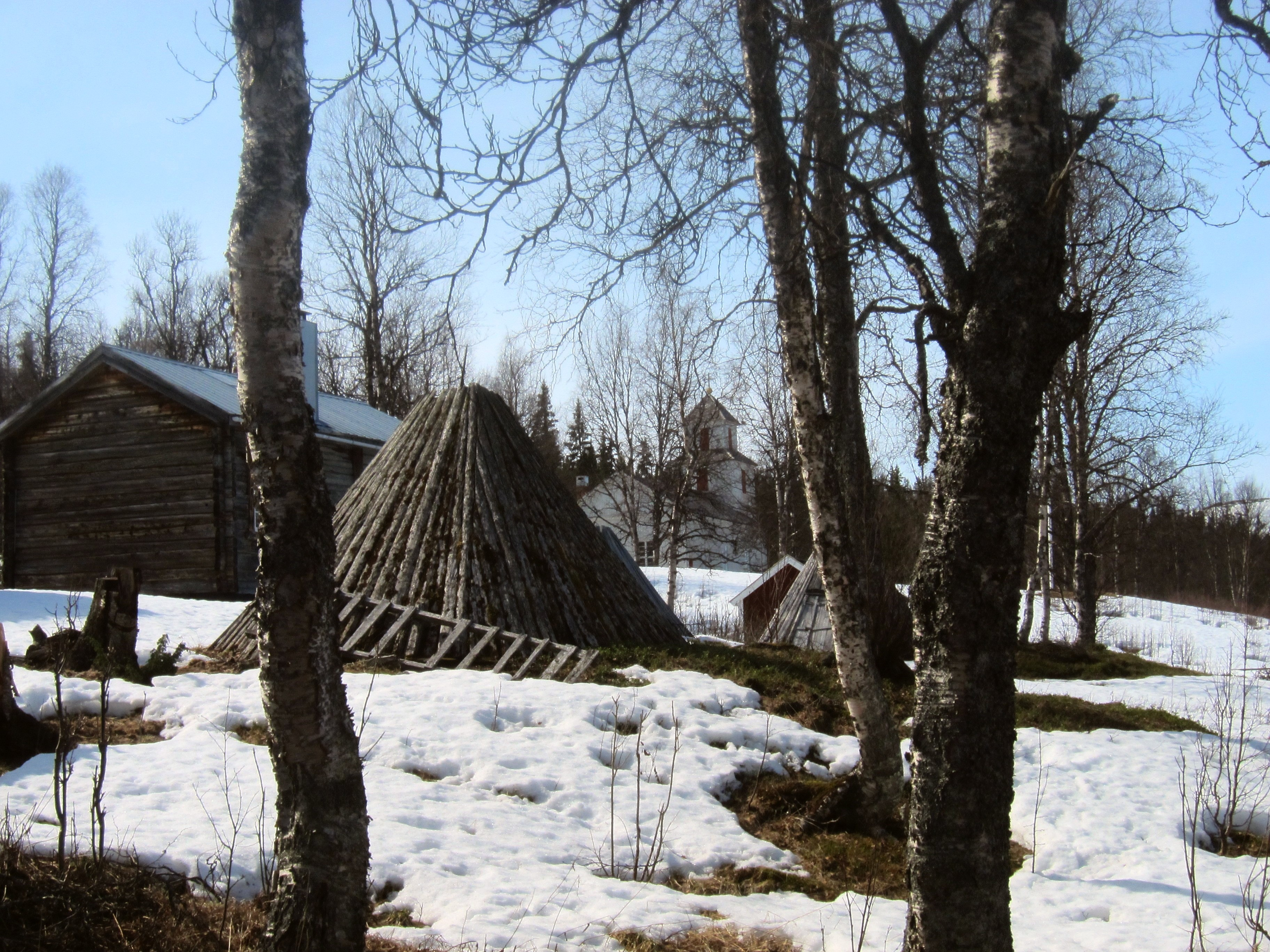 Fatmomakkes kyrkby under vårvintern.